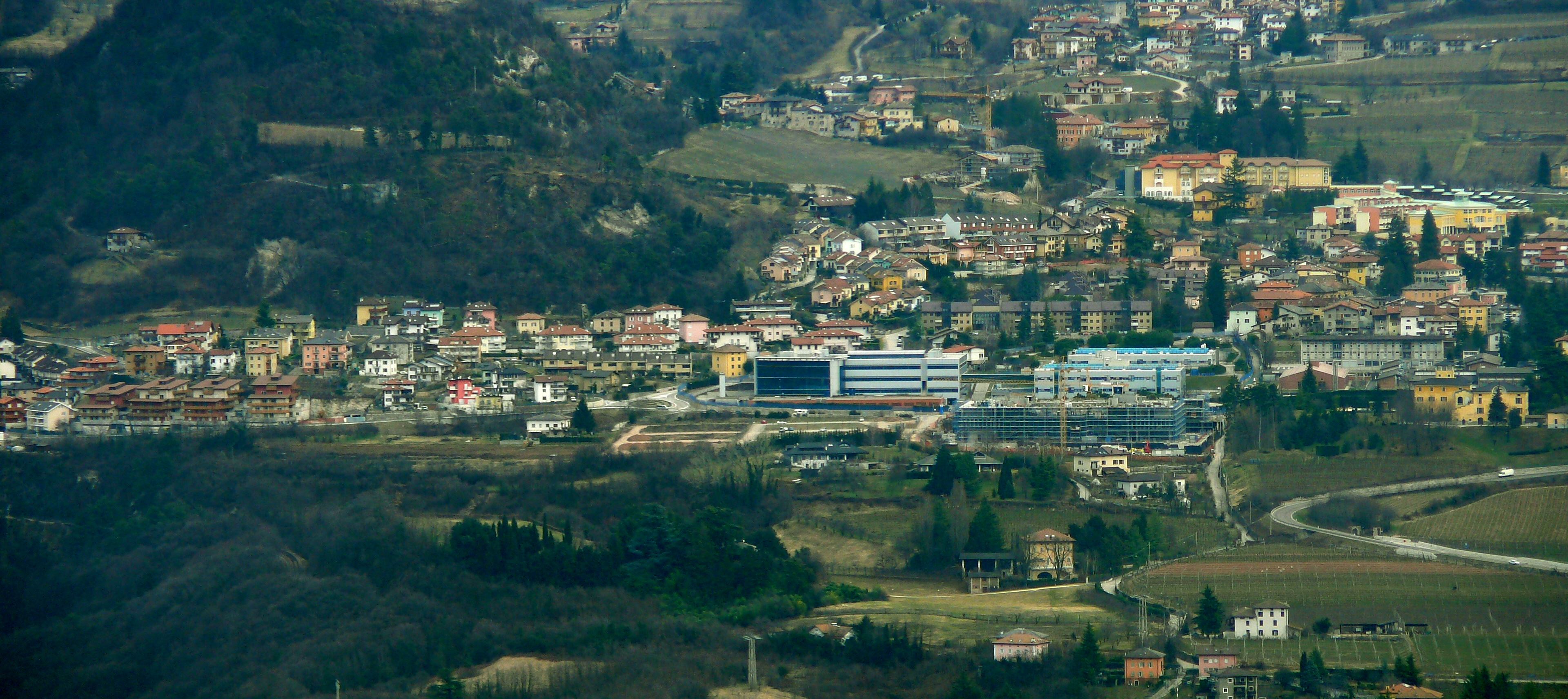 panorama di Povo, da Sardagna